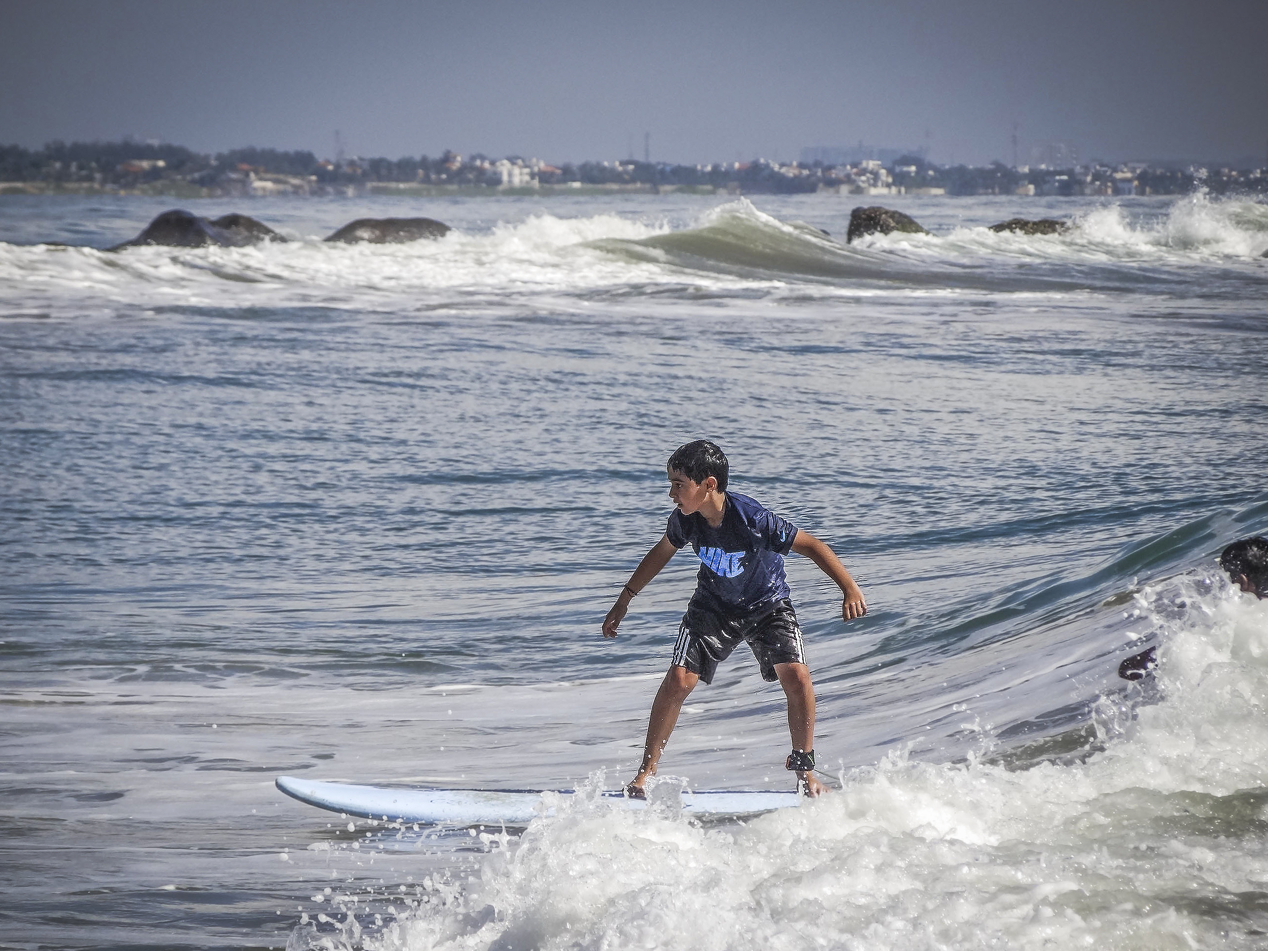 Surfing in Kovalam Beach